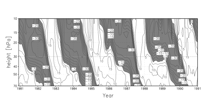 Quasi-biennial oscillation plot. Plotted in GrADS